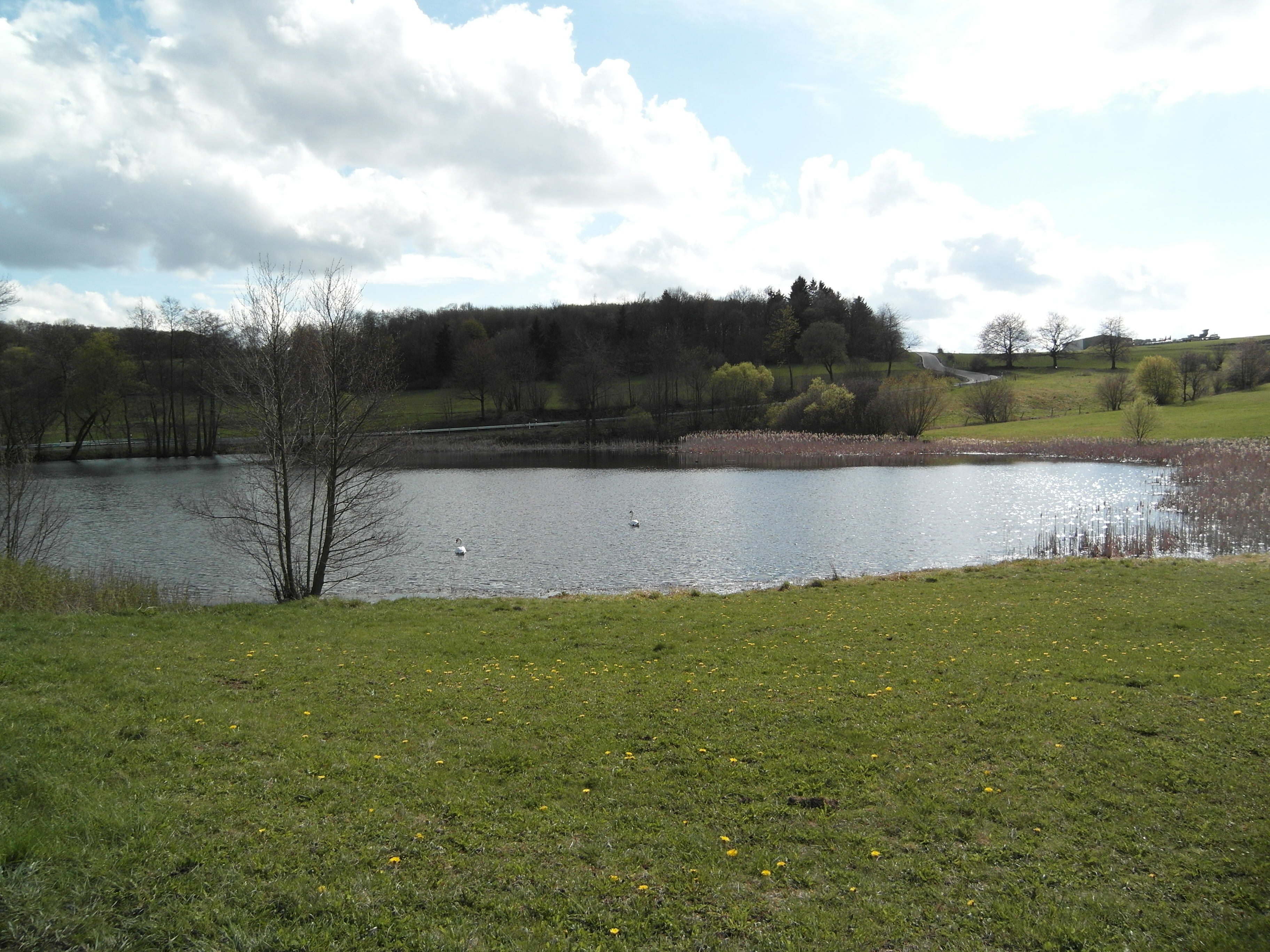 Blick auf den Klesberger Weiher mit Klesberg im Hintergrund